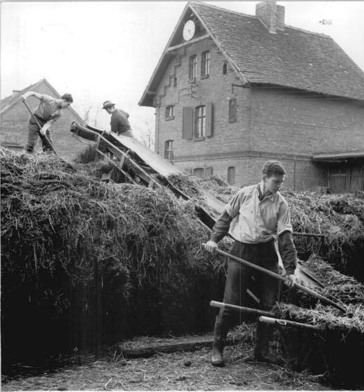 Factual corrections and alternative descriptions are encouraged separately from the original description. Additionally errors can be reported at this page to inform the Bundesarchiv. Original historic description: Lehrlinge beim Bauen eines Misthaufens Zentralbild Schaar Ml-Pr 19.4.1963 Landjugend des Bezirkes Leipzig bereitet VIII. Parlament vor In 63 LPG des Bezirkes Leipzig übernahm bisher die Landjugend die Verantwortung für Objekte in der Viehwirtschaft. Mehr als 400 Kontrollposten der FDJ tragen dazu bei, die Leistungsarbeit in den LPG, VEG und MTS zu verbessern. Nahezu 70 dt Milch mehr als der Plan vorsah erzeugten die Jugendlichen des VEG Koellitzsch im Kreis Torgau im Rinderstall der Abteilung Packisch. Die Lehrlinge dieses größten landwirtschaflichen Ausbildungsbetriebes im Bezirk Leipzig übernahmen im vergangenen Jahr den Stall Packtisch als Jugendobjekt. Gemeinsam mit einem Melkkermeister betreuen sieben Lehrlinge einen Kuh- einen Abkalbe- und einen Kälberstall. Ehemals zählte die Abteilung Packisch zu den Milchschuldnern des VEG. Nachdem die Jugendlichen die Verantwortung für den Stall übertragen bekamen, wurde innerhalb weniger Monate das Defizit ausgeglichen. UBz: Gut gepflegter und gestapelter Mist ist eine Voraussetzung für die Erhöhung der Bodenfruchtbarkeit. 300 DM Prämie erhält die Stallbrigade, die den besten Stapel setzt. Die Jugendbrigade hat alle Aussichtung, diese Prämie zu erhalten.